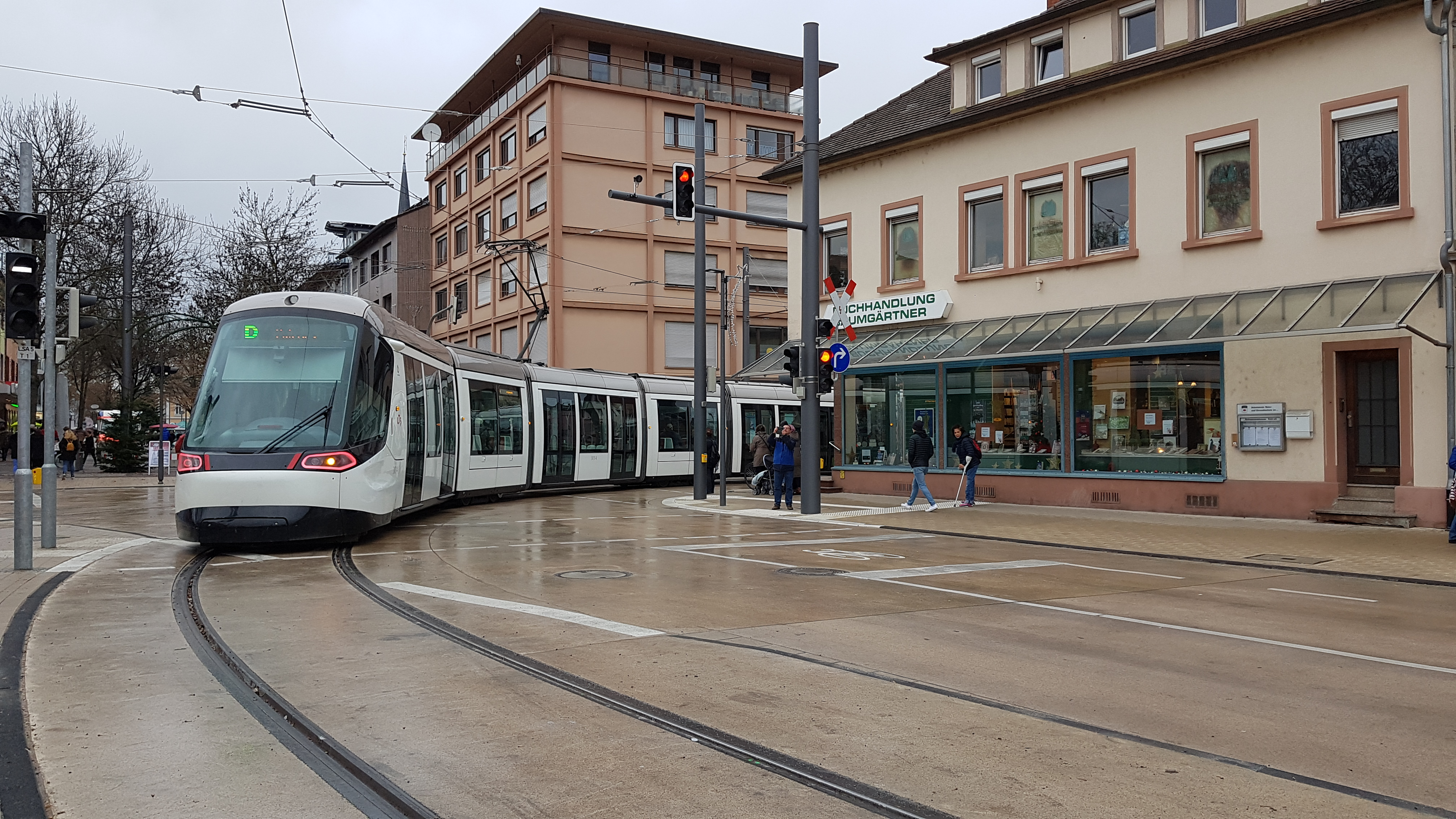 Rame Citadis quittant la station Kehl Rathaus